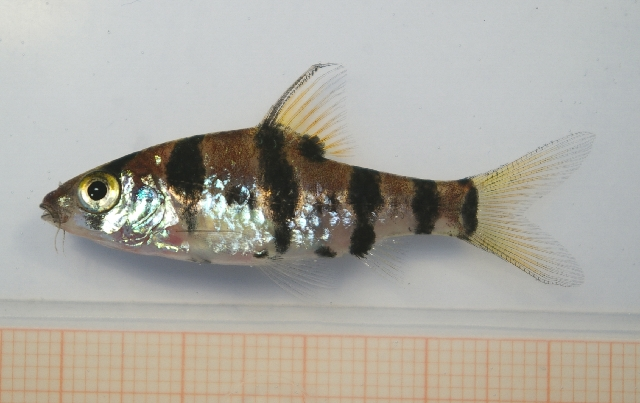 Foerschs Barbe (Puntius foerschi)